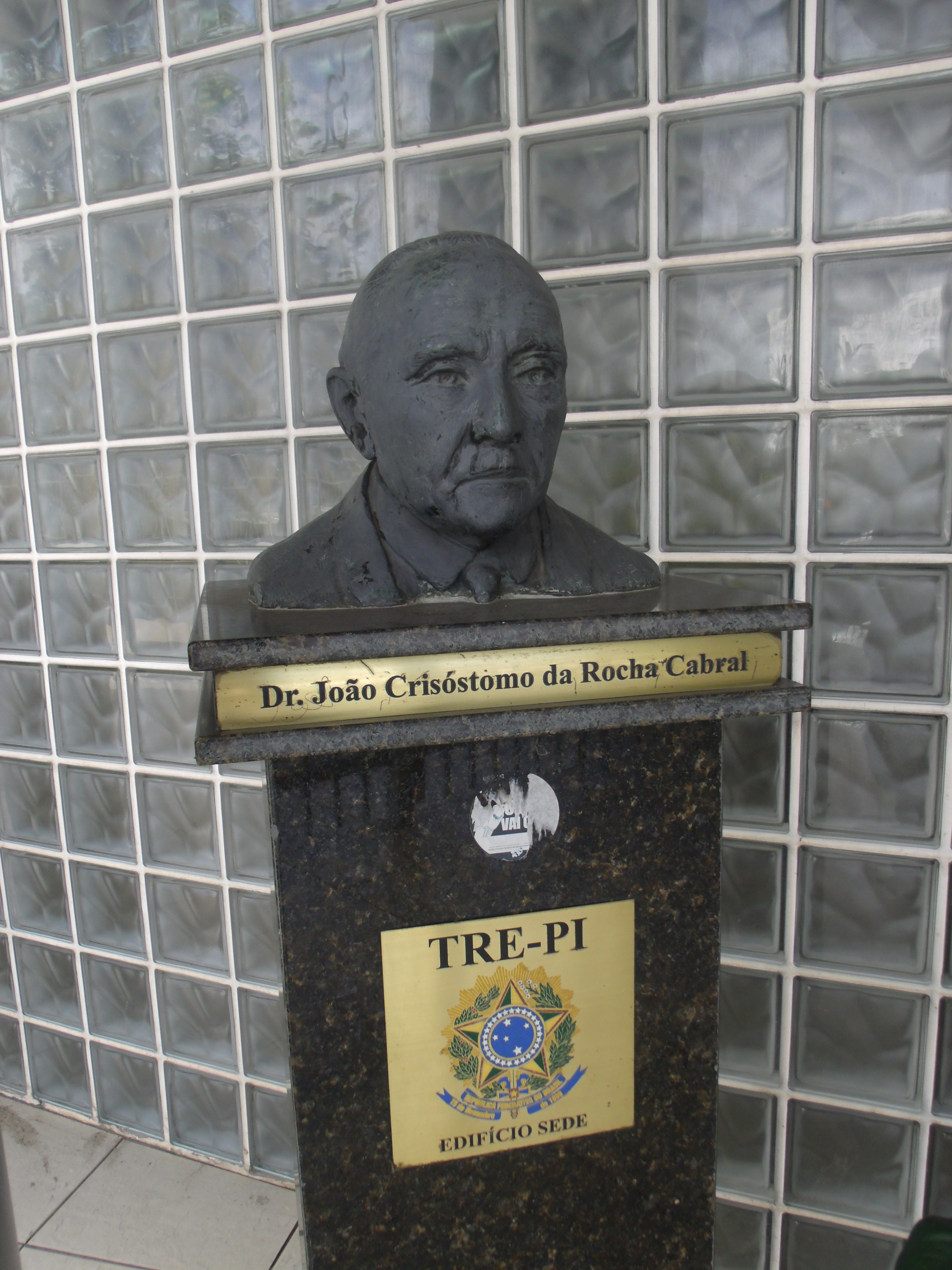 Busto de João Crisóstomo da Rocha Cabral no pátio de frontaria do Tribunal regional Eleitoral do Piauí.